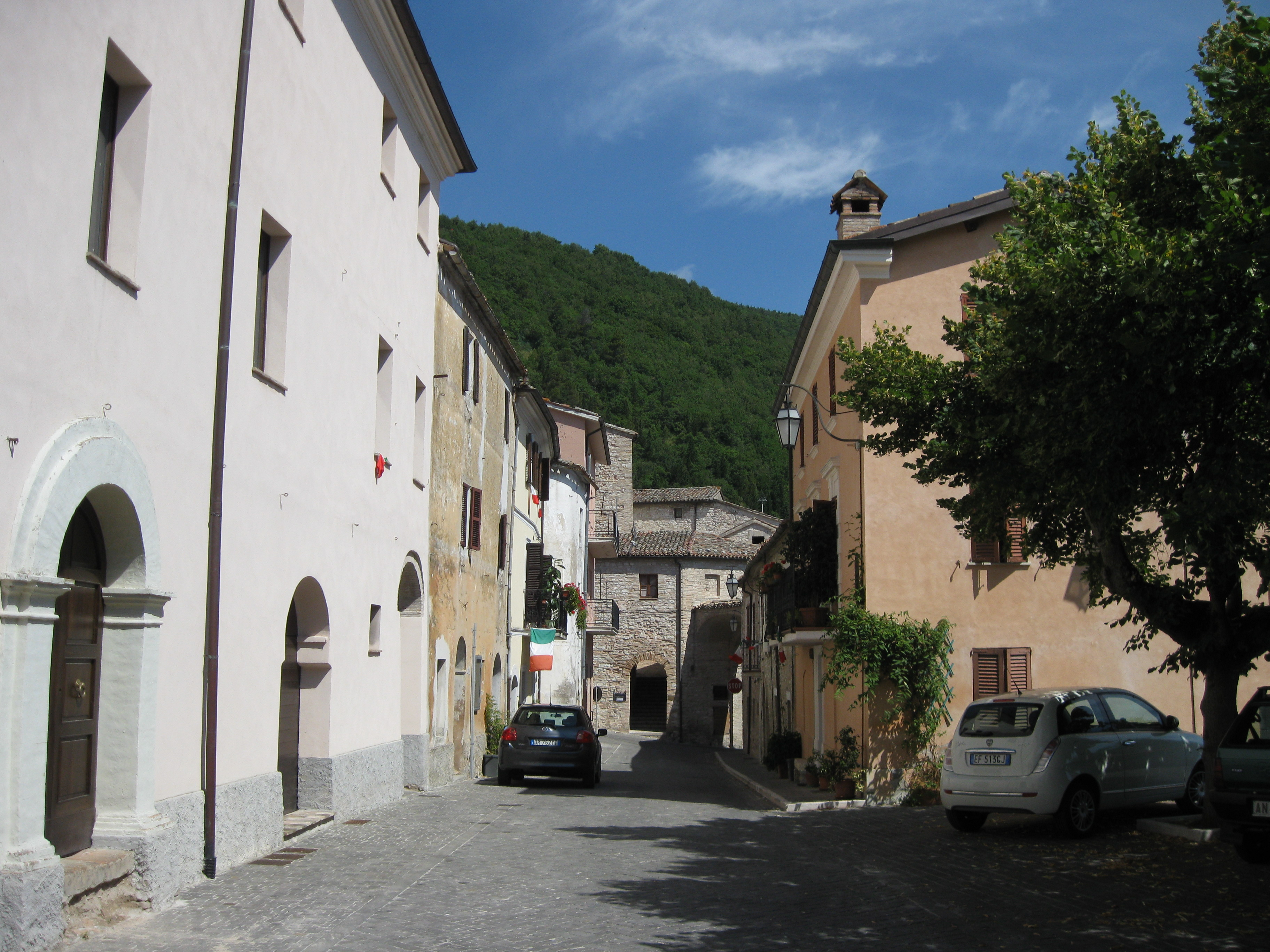 Via Roma, Genga, Italien